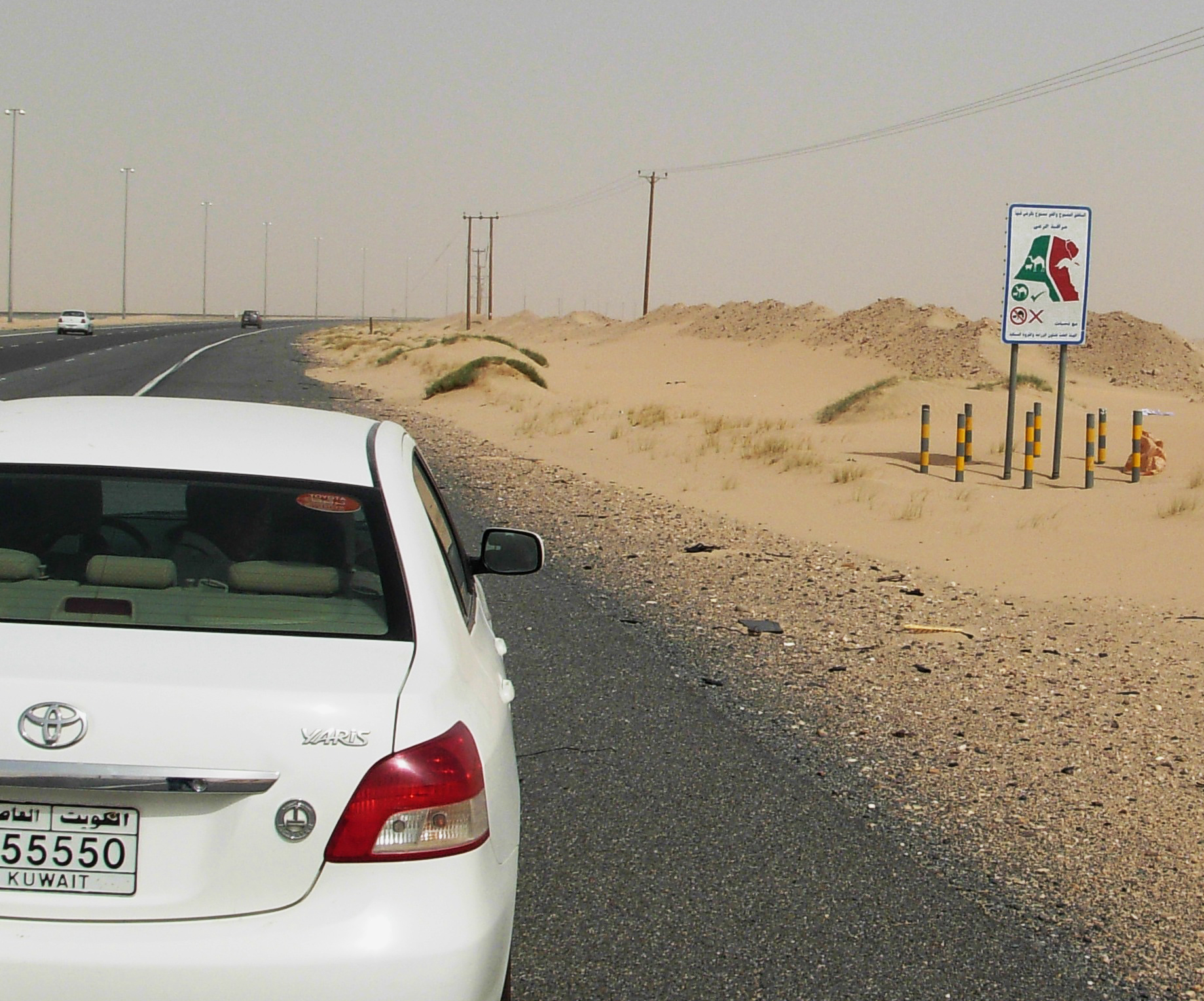 ഒട്ടകങ്ങൾ റോഡ് മുറിച്ചുകടക്കാൻ സാധ്യതയുള്ള ഇടങ്ങളിലെ മുന്നറിയിപ്പ്. കുവൈറ്റിലെ ജഹറാ റോഡിൽ നിന്നുള്ള പടം. കുവൈറ്റ് രാജ്യത്തിന്റെ ആകൃതിയിലാണ് ഈ ചിഹ്നം രൂപപ്പെടുത്തിയിരിക്കുന്നത്.